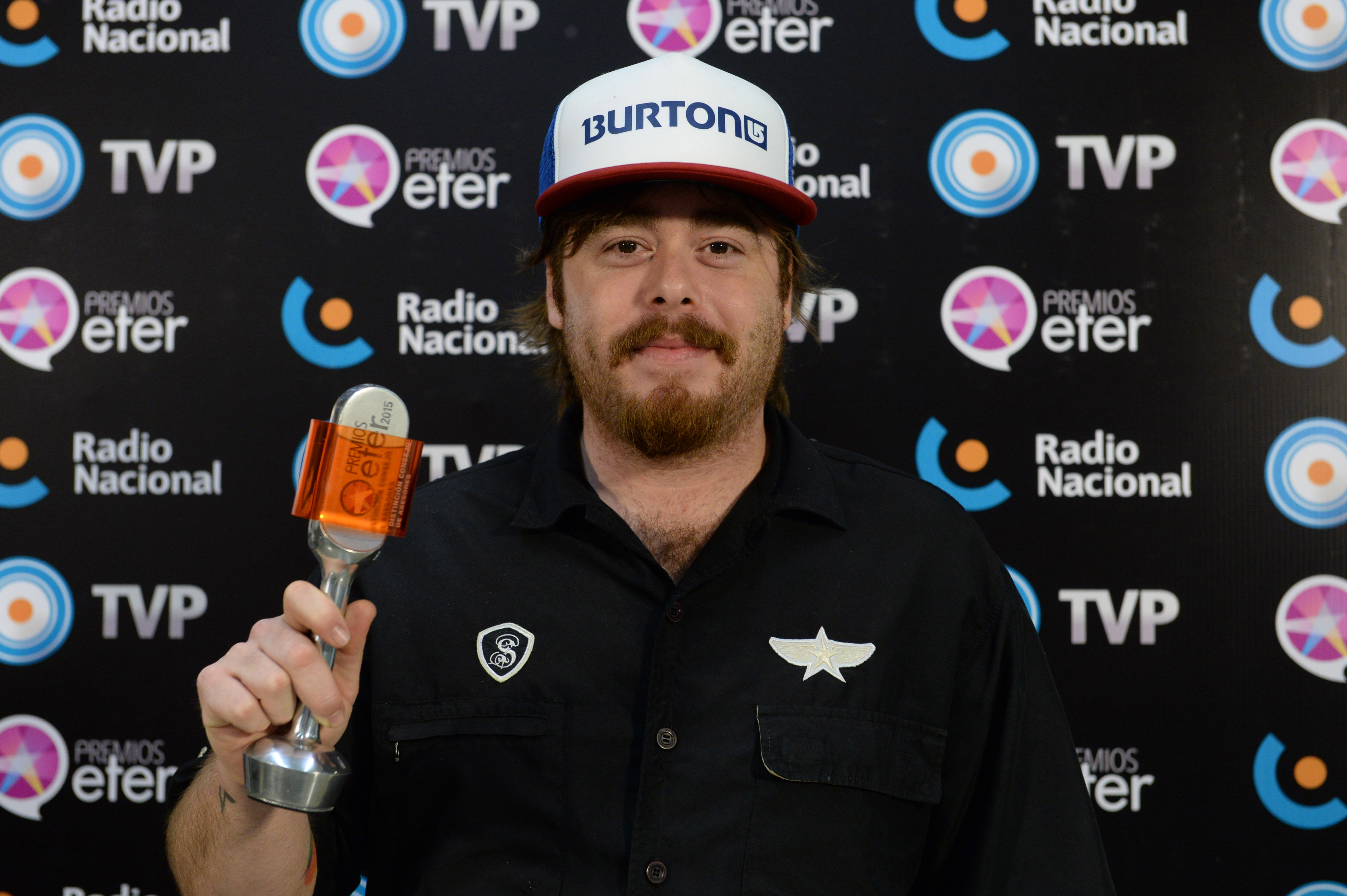 Premios Eter 2015